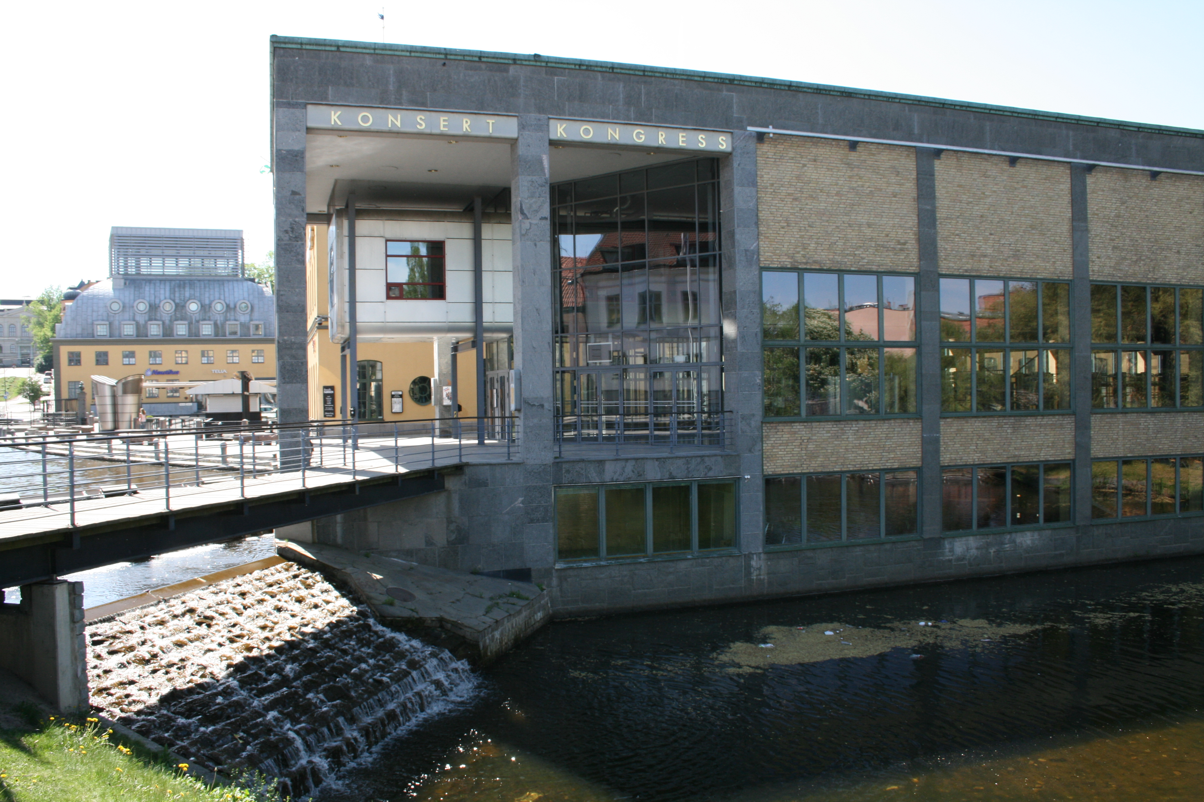 Louis De Geer, konserthus i Norrköping